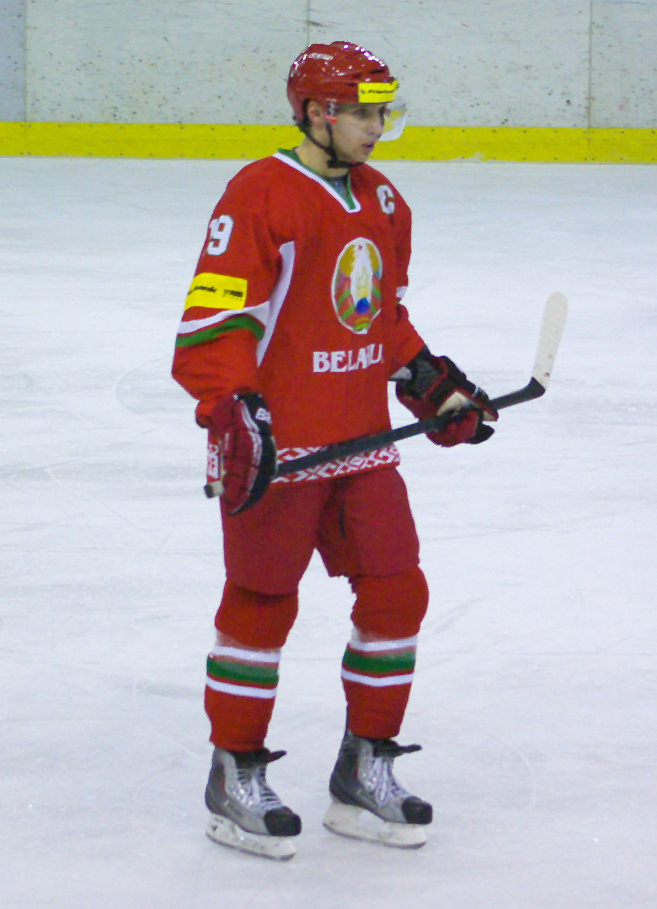 Artur Haurus podczas Mistrzostw Świata Juniorów w Hokeju na Lodzie 2014 I Dywizji w Sanoku, Białoruś - Dania 4:5, Arena Sanok 18 grudnia 2013